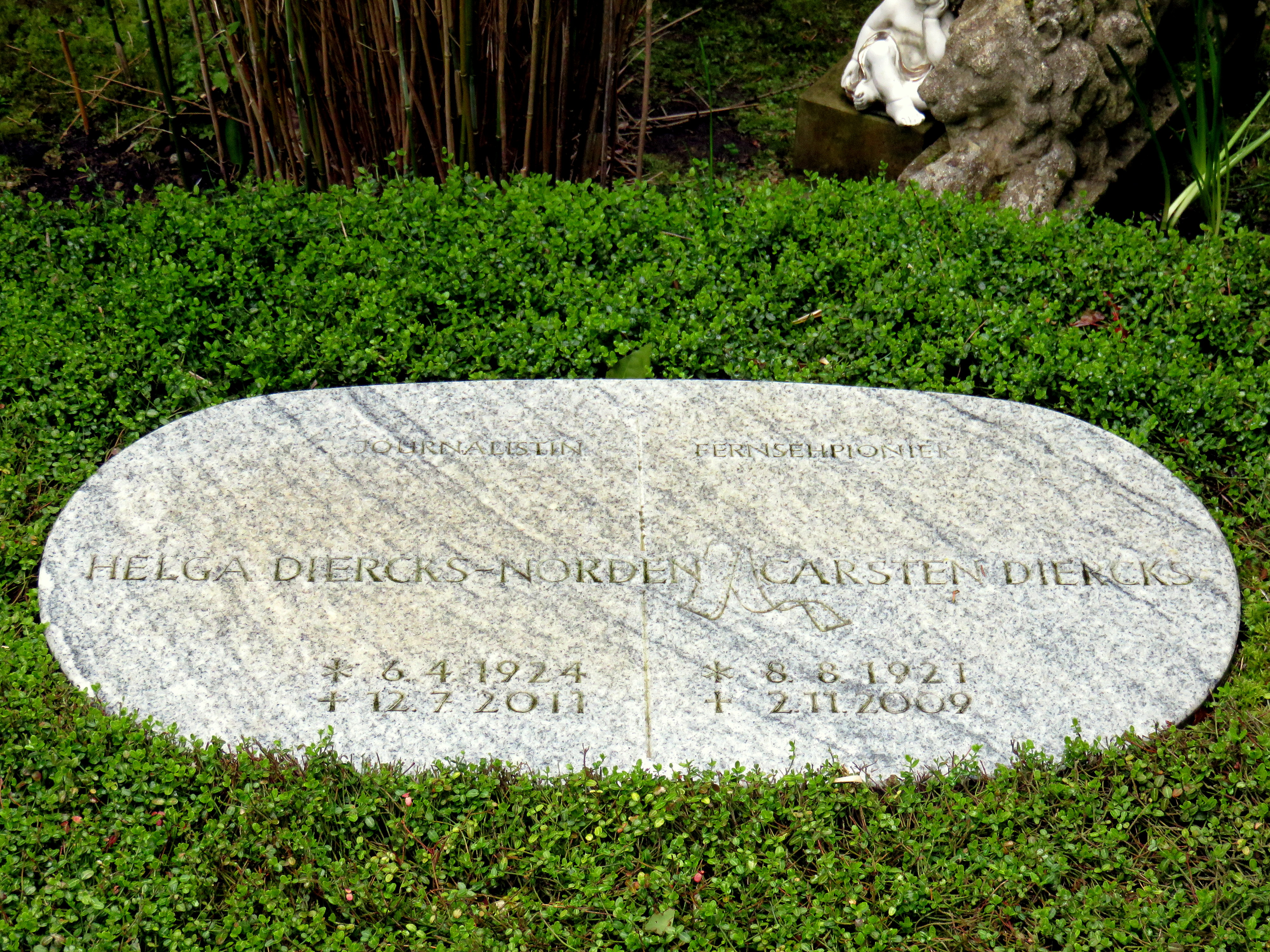 Familiengrabstätte der deutschen Journalistin Helga Diercks-Norden in Sichtweite des Gartens der Frauen auf dem Ohlsdorfer Friedhof in Hamburg-Ohlsdorf (unmittelbar an der Cordesallee gelegen), offiziell (= lt. Auskunft der Friedhofsverwaltung): "in Anbindung von außerhalb des Gartens". Schwierige fotografische Darstellung wegen extremer Himmelspiegelung.